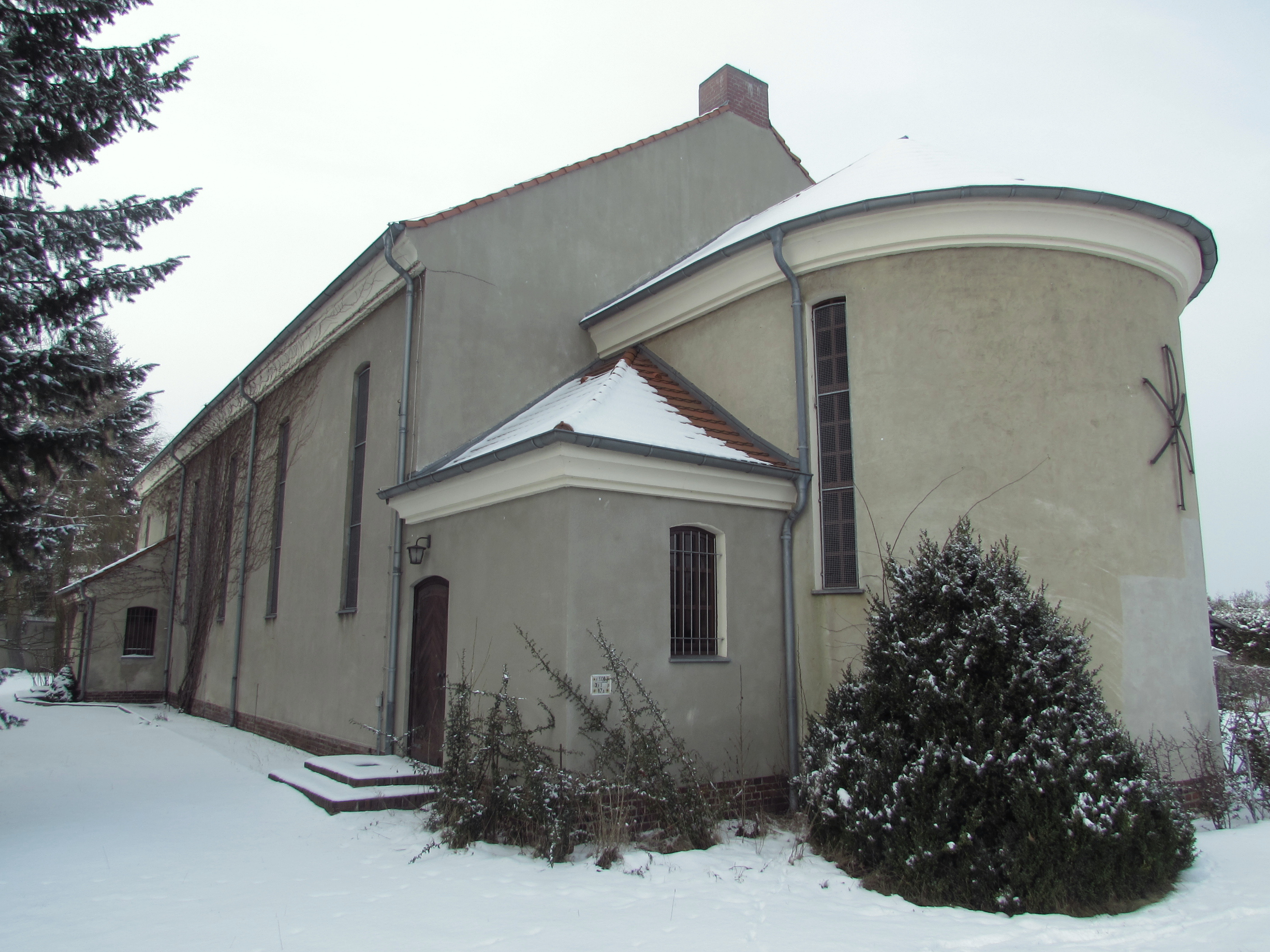 auferstehungskirche brandenburg von südost